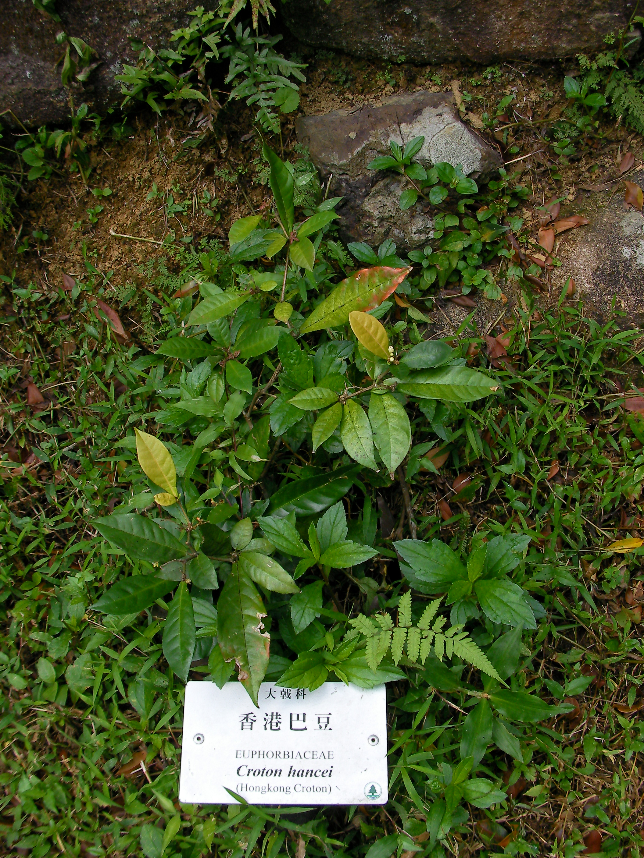 Croton hancei (Hong Kong Croton) taken in Shing Mun Arboretum, Hong Kong